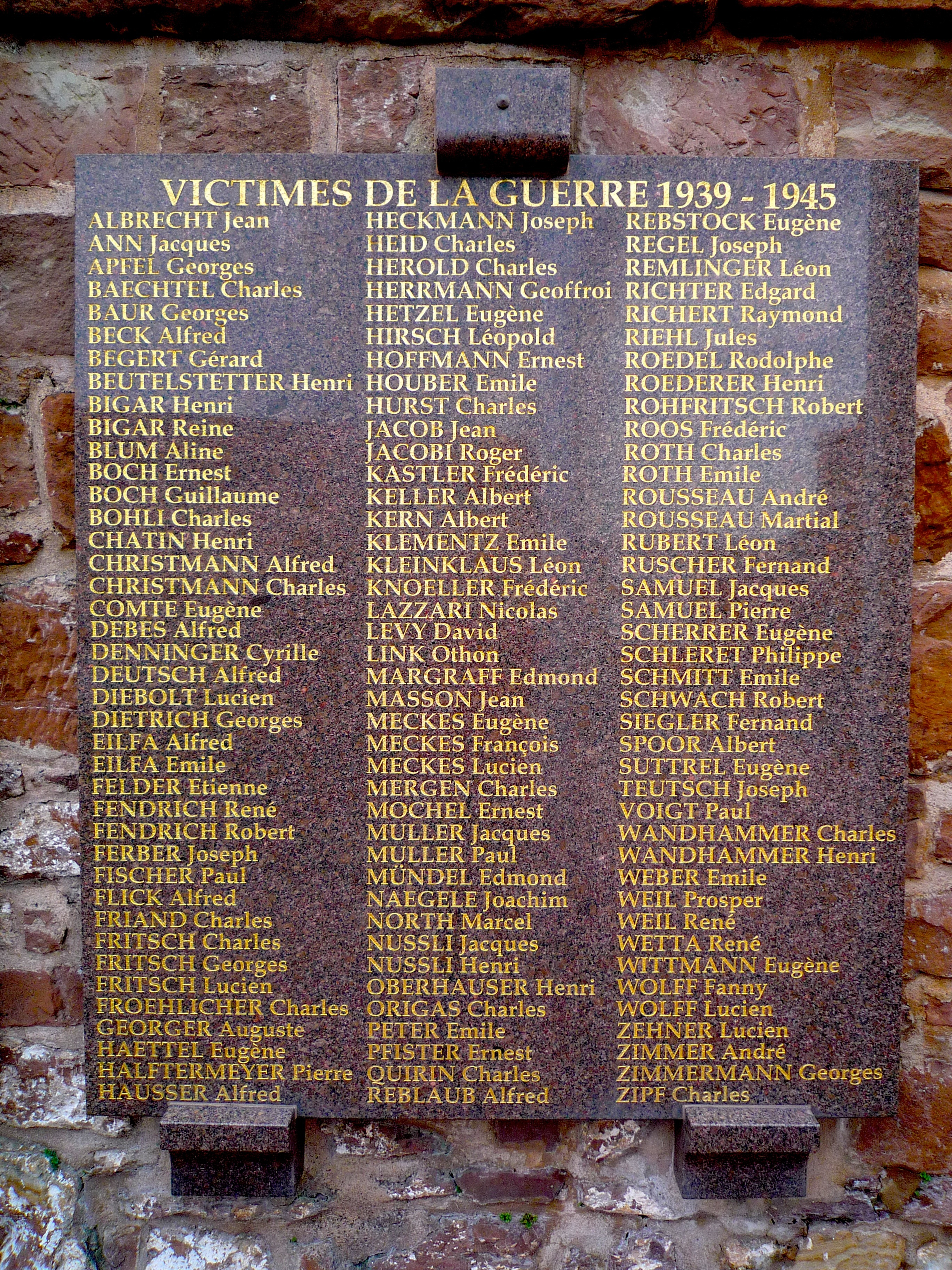 Wasselonne le monument aux morts 1939-1945.